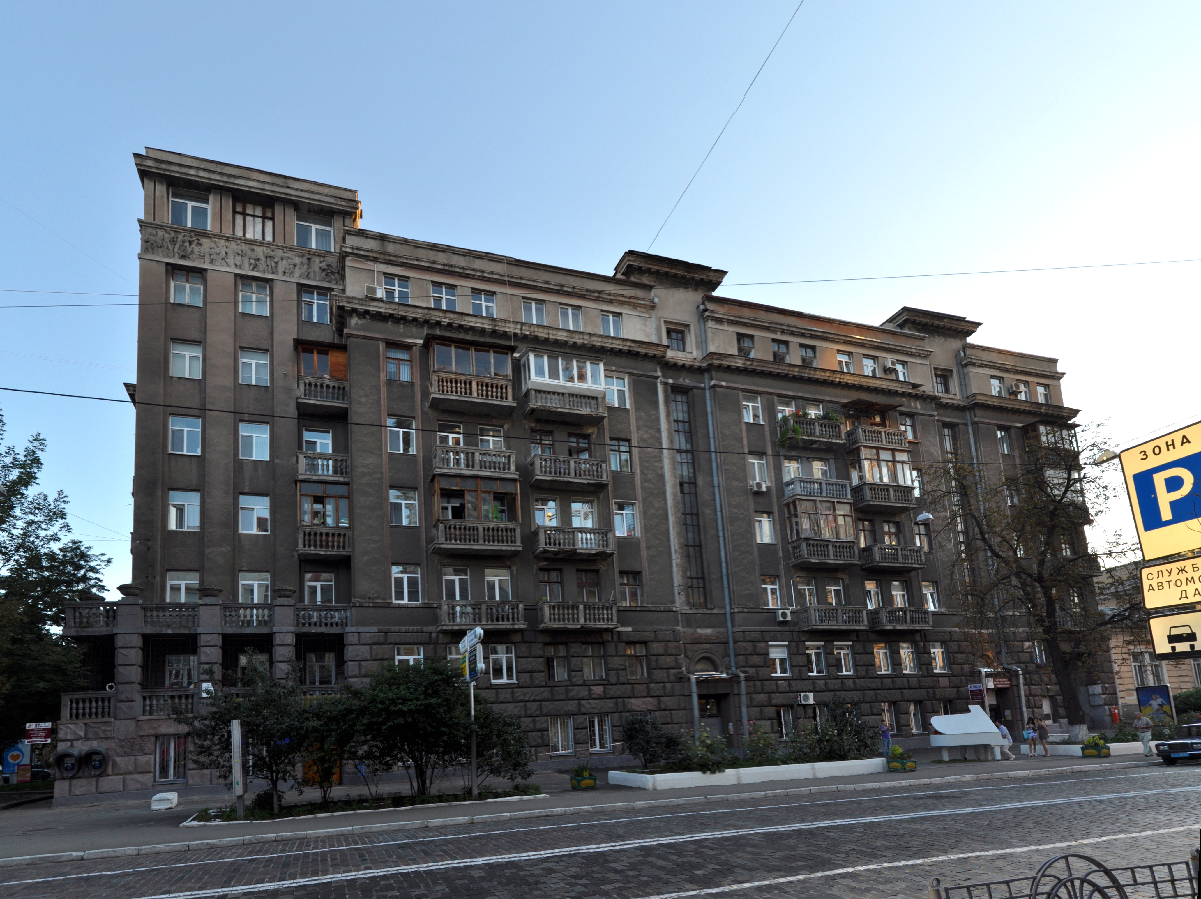 Будинок житловий співробітників наркомгоспу УРСР, Київ, Пирогова вул., 2/37